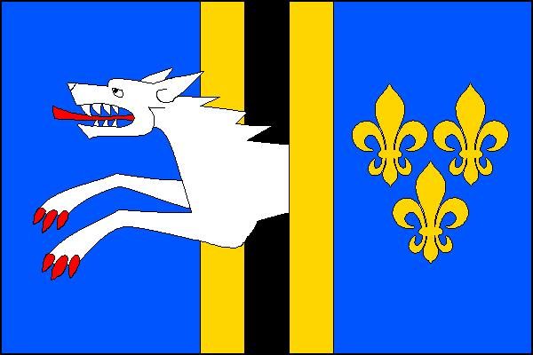 Vlajka obce Nemyslovice